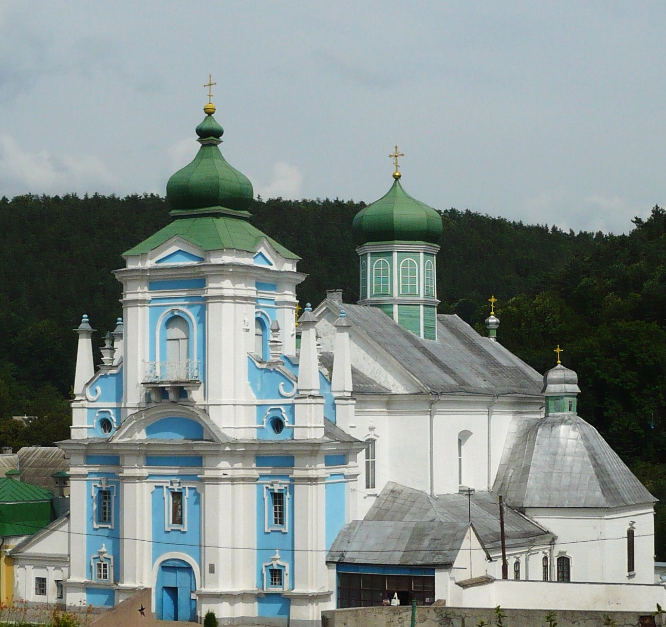 Kościół franciszkanów, ob. pw. św. Mikołaja w Krzemieńcu